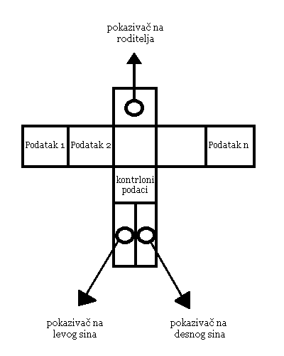 Srpski (latinica): Čvor T-stabla